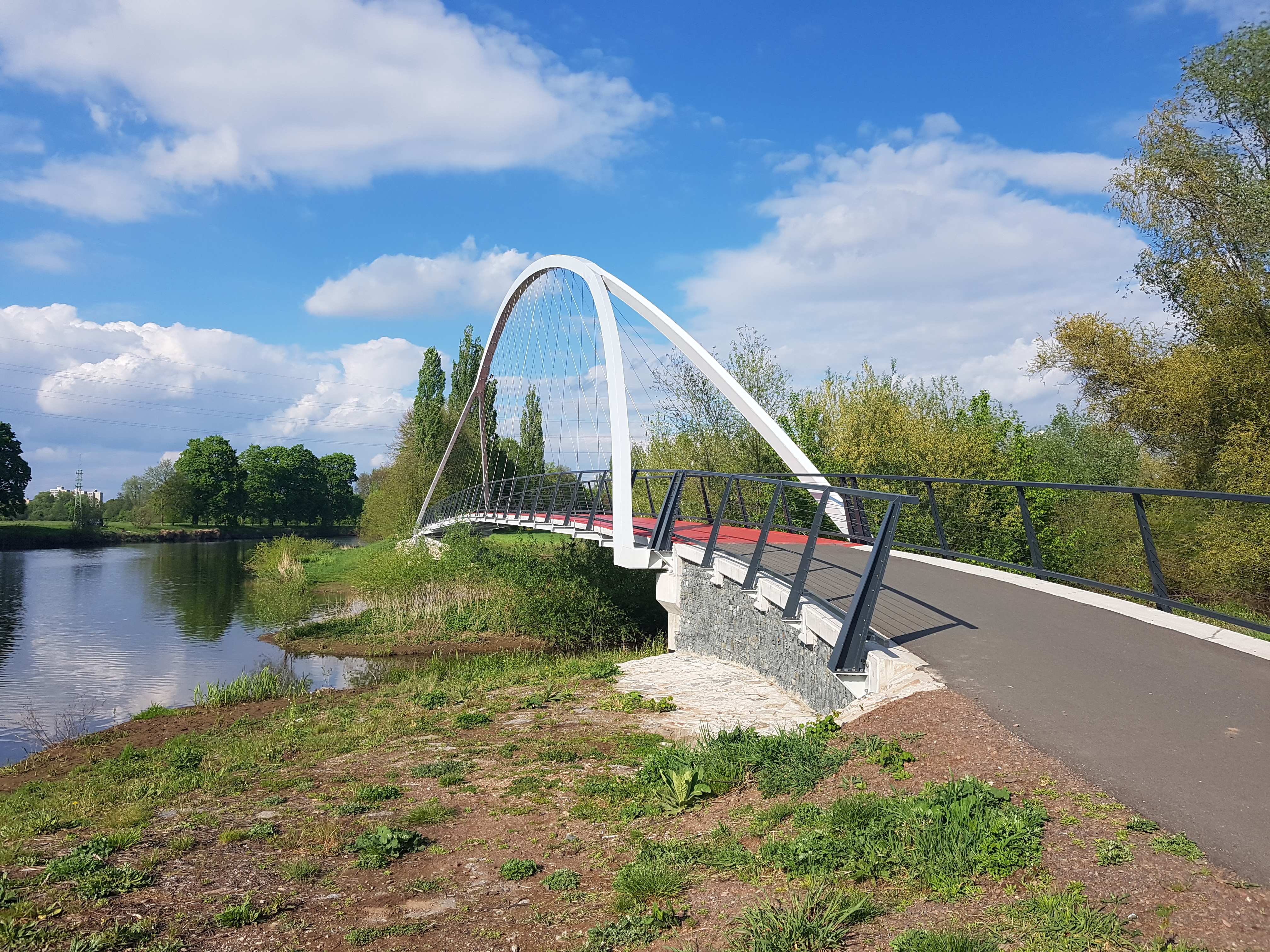 Lávka přes Jesípek na cyklostezce Hradec Králové – Vysoká nad Labem